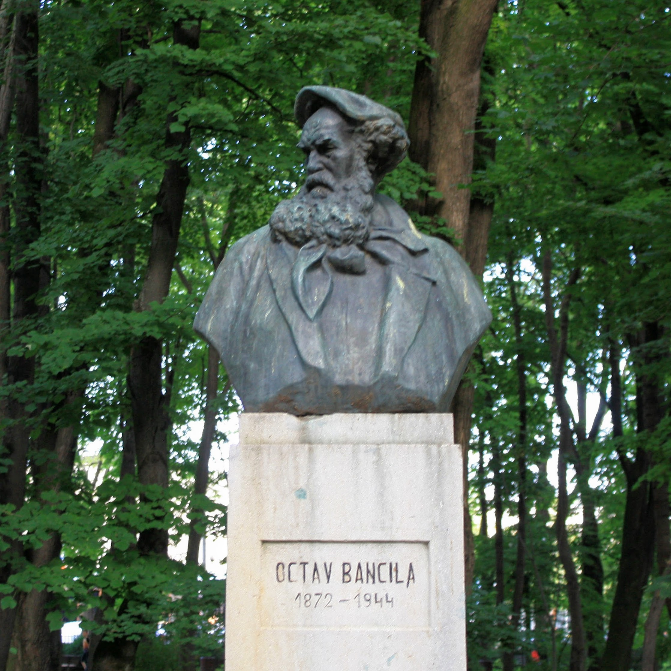 Bustul lui Octav Băncilă din Parcul Copou, Iaşi